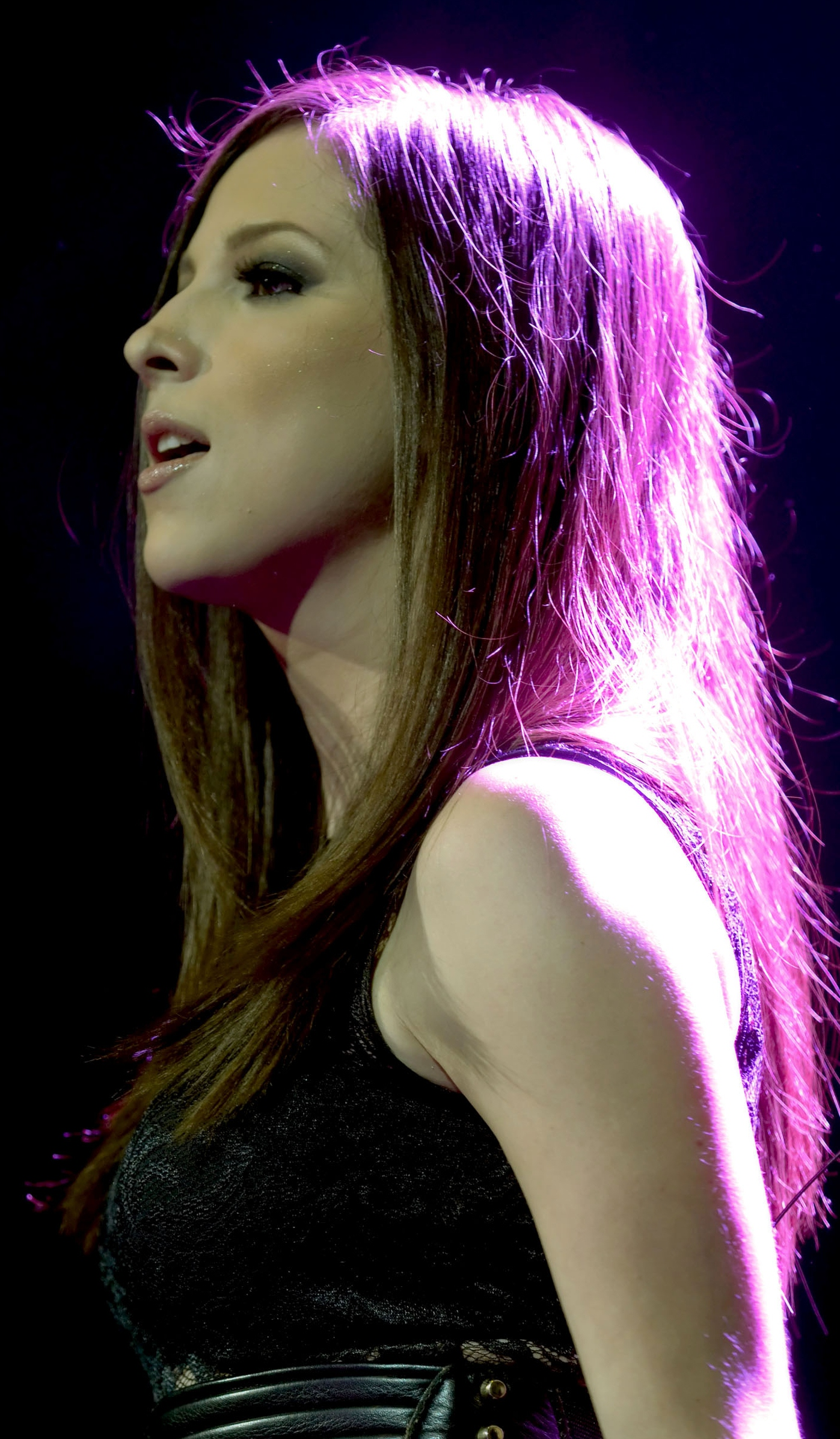 Paty Cantu en Concierto